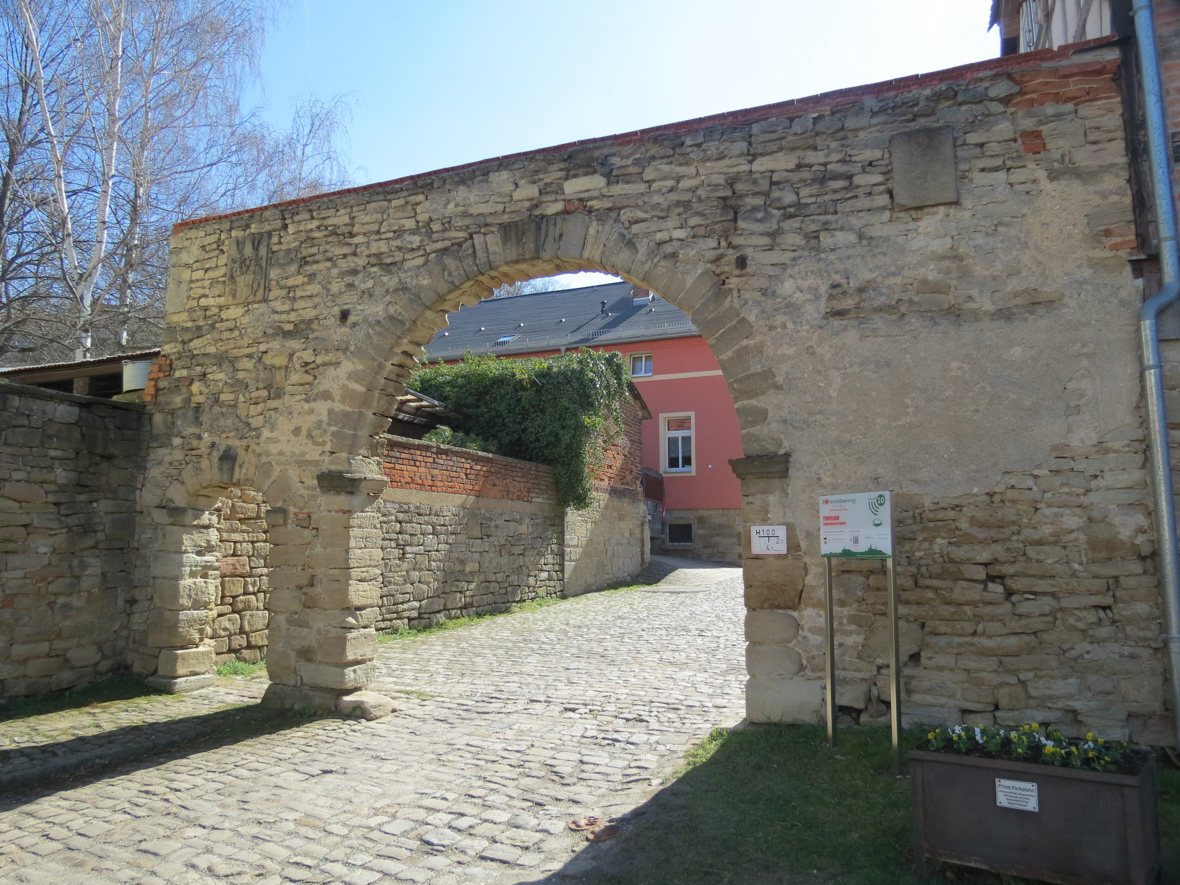 Tempeltor, Droyßig, Burgenlandkreis, Sachsen-Anhalt